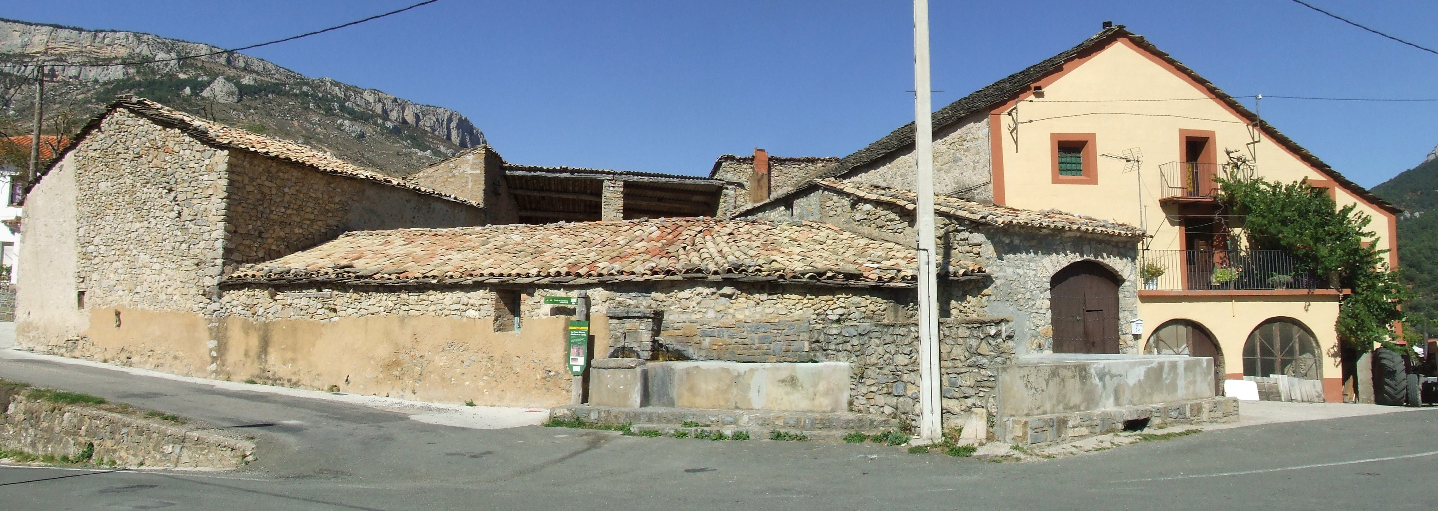 Cal Baró (Bóixols, Abella de la Conca, Pallars Jussà)